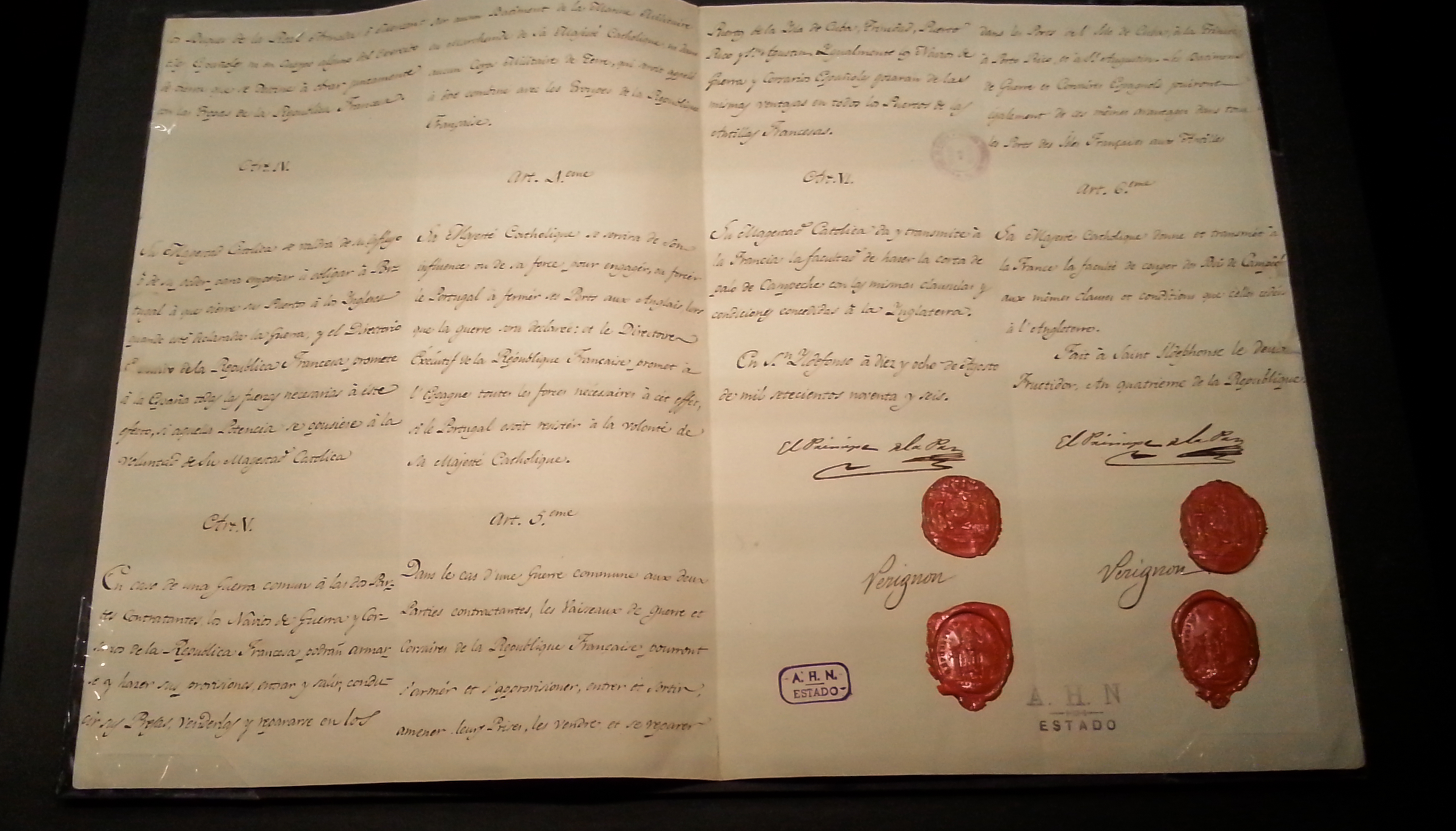 Tratado de San Ildefonso. En el marco de las nuevas relaciones entre Francia y España establecido en 1795 con la Paz de Basilea, el 18 de agosto de 1796 se firmó en San Ildefonso (Segovia), un nuevo acuerdo mediante el cual pactaron una alianza militar frente a terceros. El tratado comprometía España a contribuir con ayuda militar y naval. Exposición de la Fragata Mercedes en 2015 en el Museo Arqueológico de Alicante (MARQ).